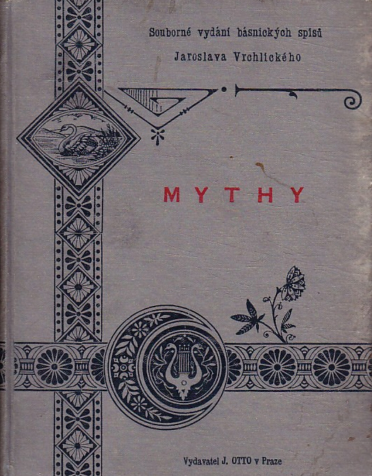 Mythy, básnická sbírka Jaroslava Vrchlického